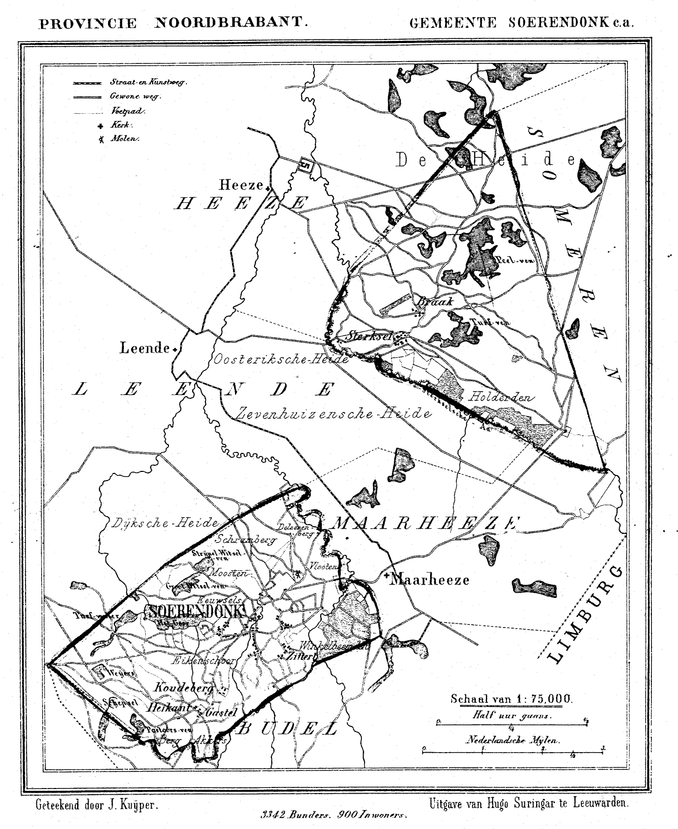 Nederland, Noord-Brabant, Gemeente Soerendonk